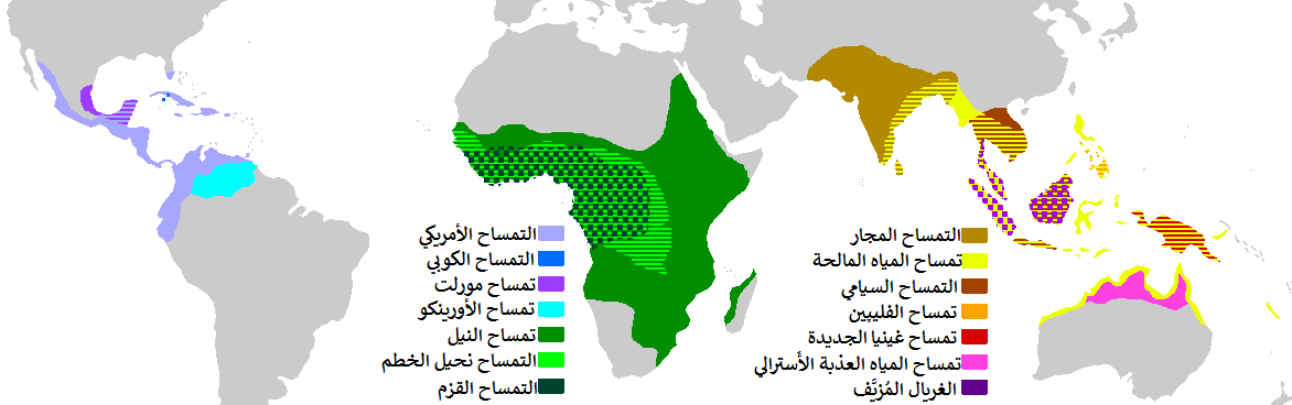 خريطة تُظهر موطن جميع أنواع التمساحيَّات الباقية على سطح الأرض.